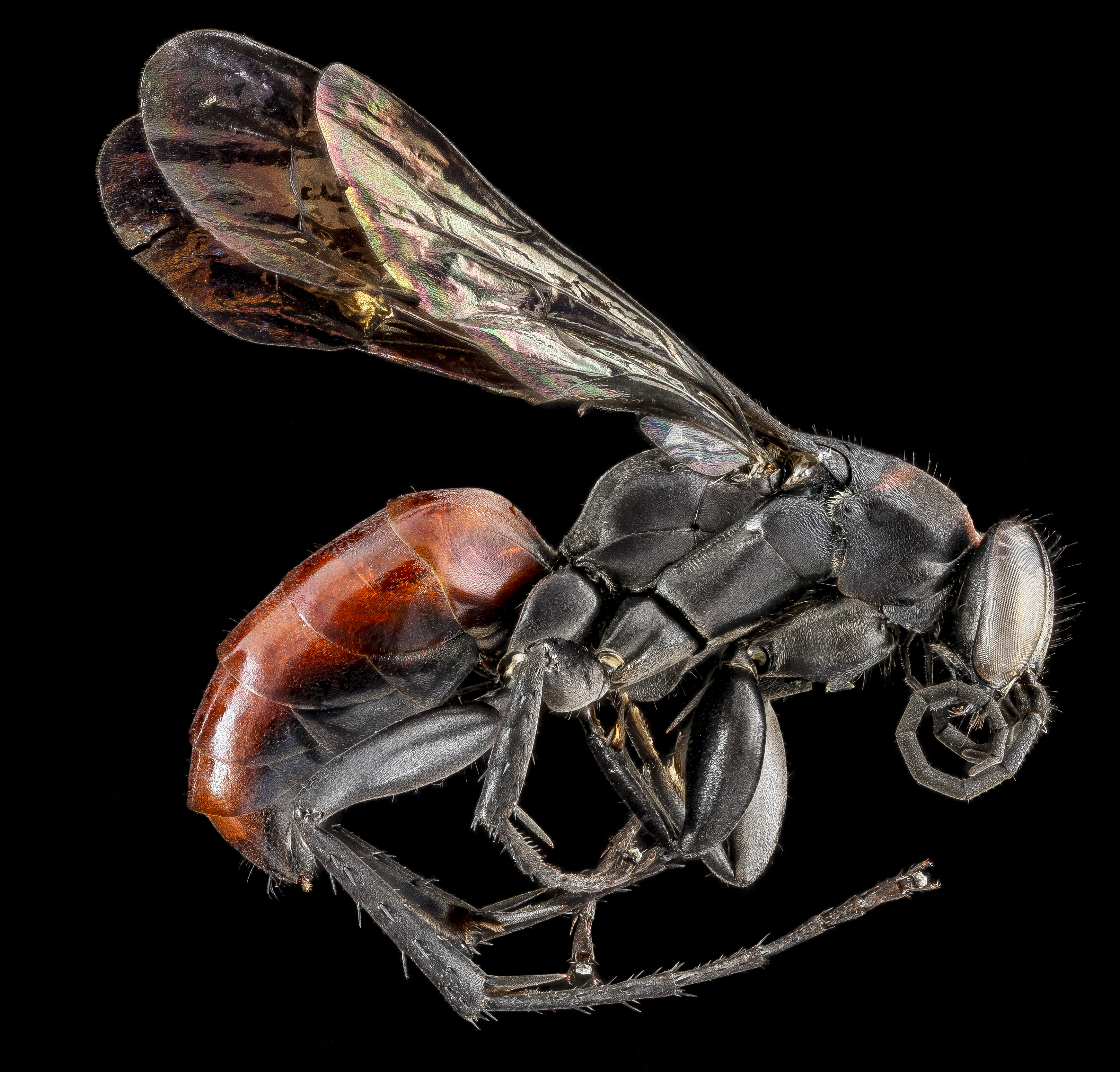 Drepanaporus collaris, Dominican Republic, La Vega, determination by Pompilid guru Juanita Rodriguez